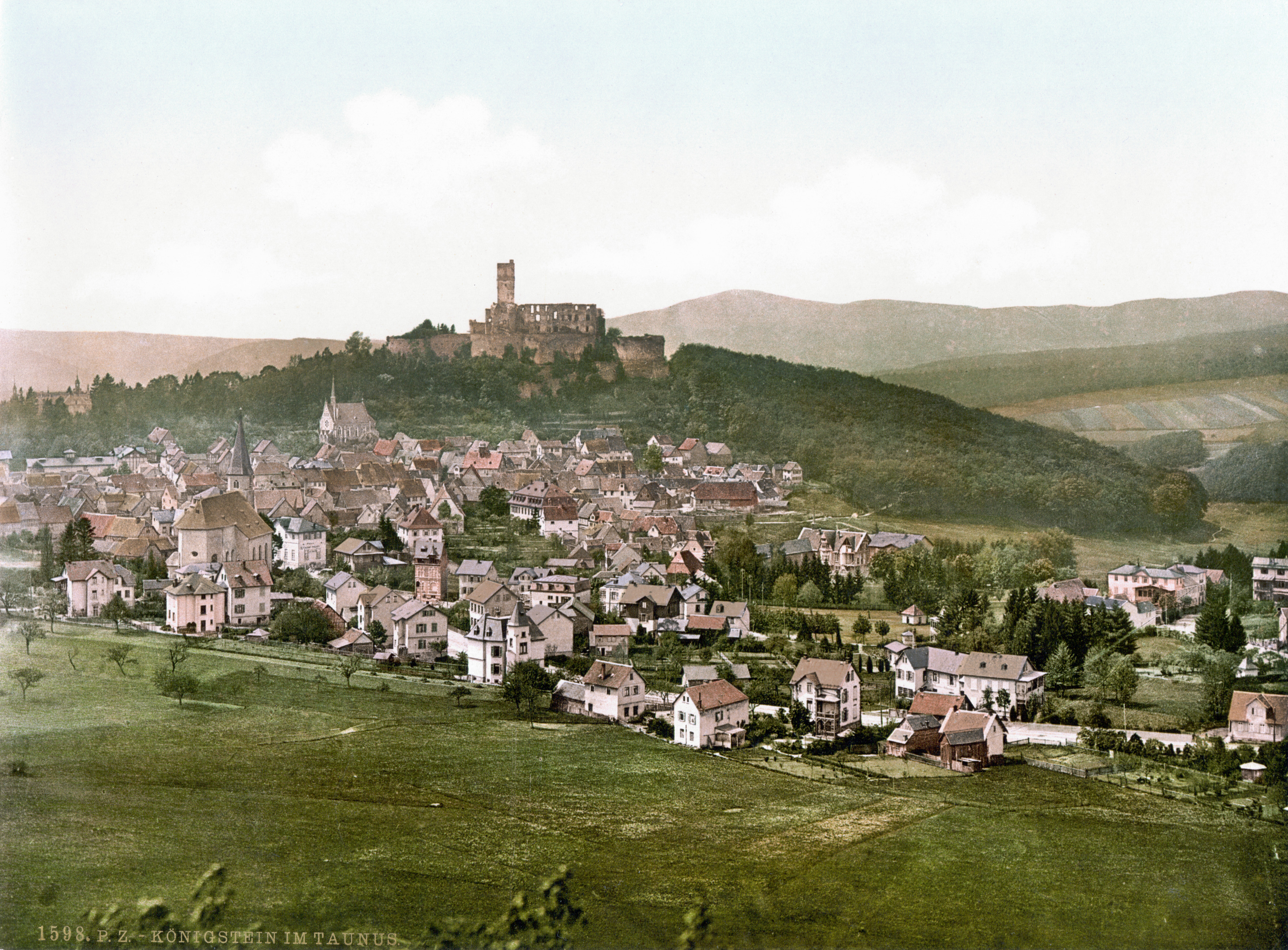 Ansicht von Königstein im Taunus (ca. 1890-1900)